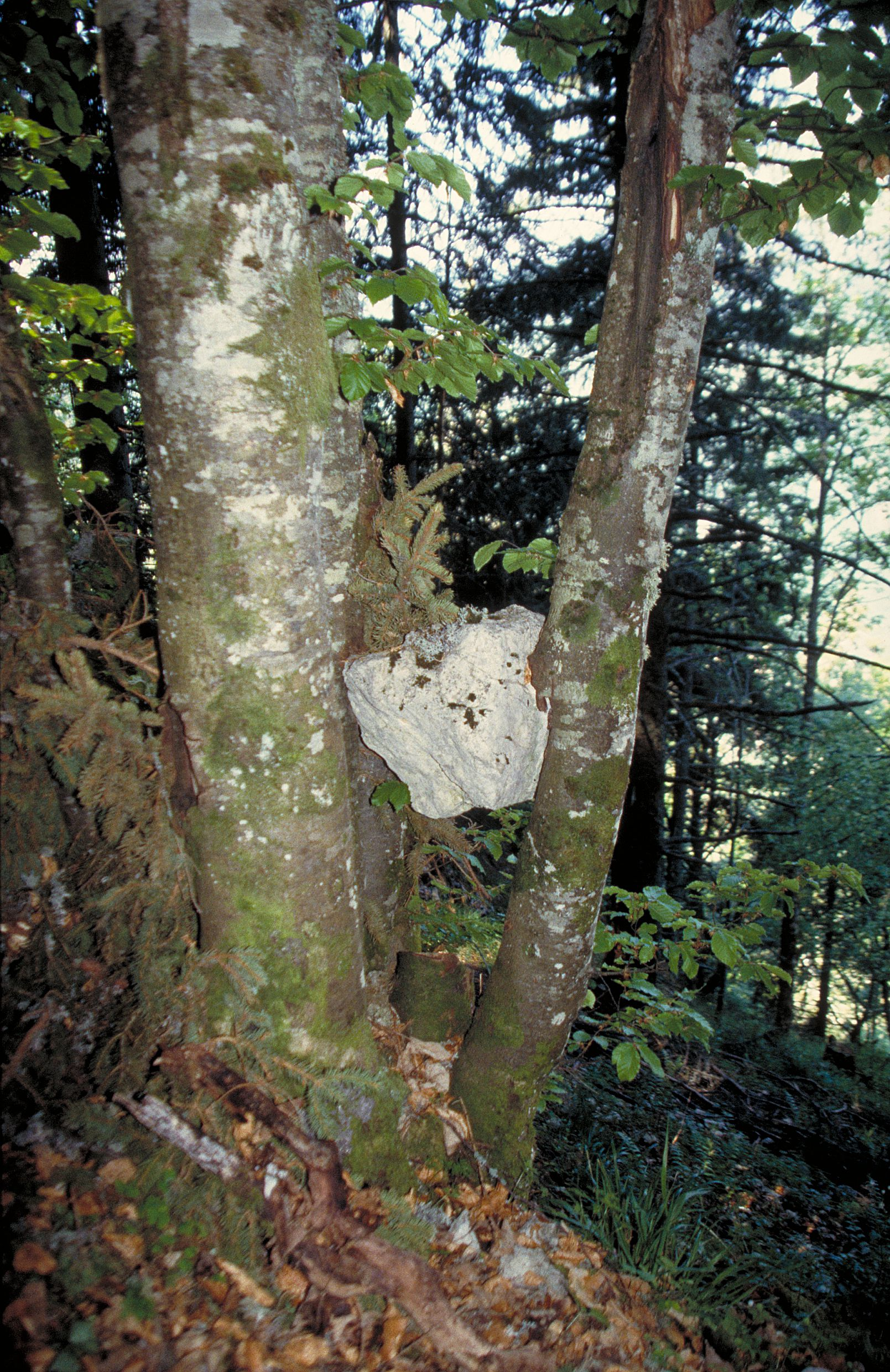 Chute de bloc et forêts de montagne